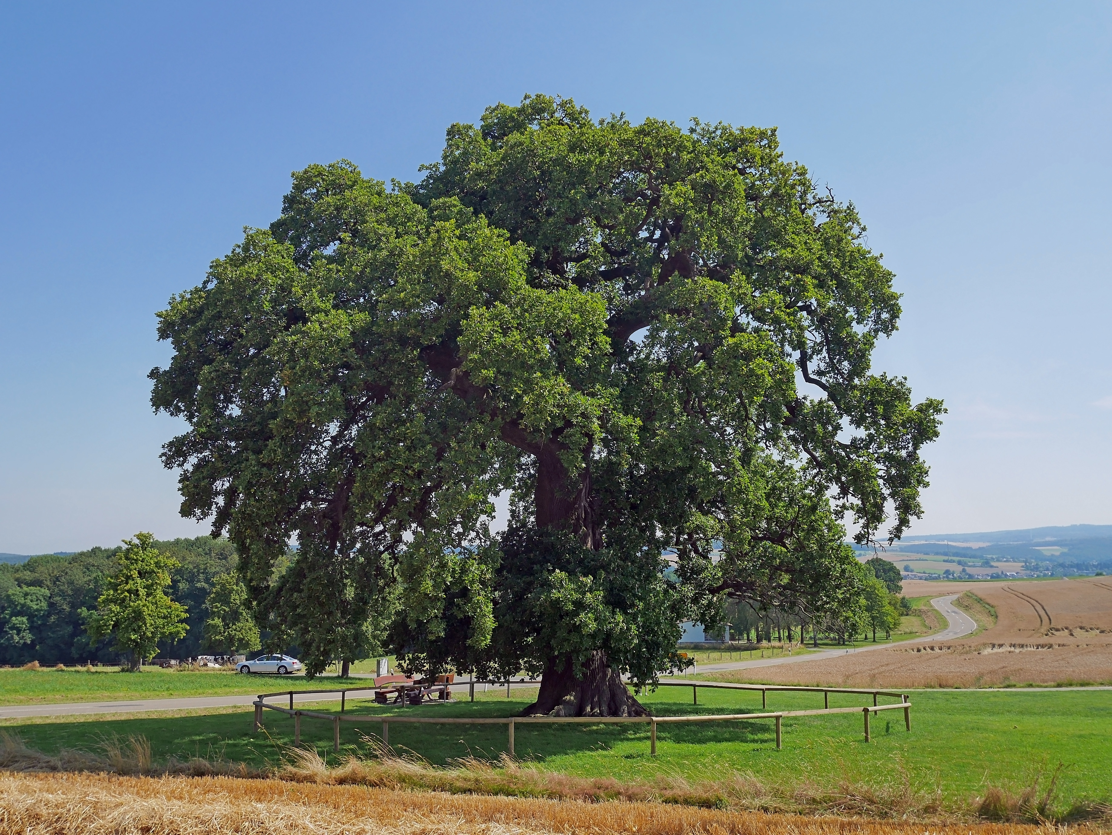 Die "Schöne Eiche" bei Endlichhofen wird in der Literatur mehrmals als schönste Eiche Deutschlands bezeichnet. Im Jahre 2014 lag der Brusthöhenumfang bei 7,55 m, bei einer Höhe von 18 m. Die Eiche ist nach dem Ersten Weltkrieg zur Zeit der Rheinlandbesetzung bei französischen Truppenübungen in Brand geraten. Gegen Ende des Zweiten Weltkrieges beschoss deutsche Artellerie von Westen heranrückende Amerikaner, wobei die Eiche getroffen wurde und zwei Starkäste absprengte. Gegen Ende der 1970er Jahre entstand im hohlen und mit Mulm gefüllten Stamm ein Brand, den die Feuerwehr nur mit chemischen Mitteln löschen konnte. Seit Mitte der 1990er Jahre leitet die Eiche unter dem Gemeinen Schwefelporling.